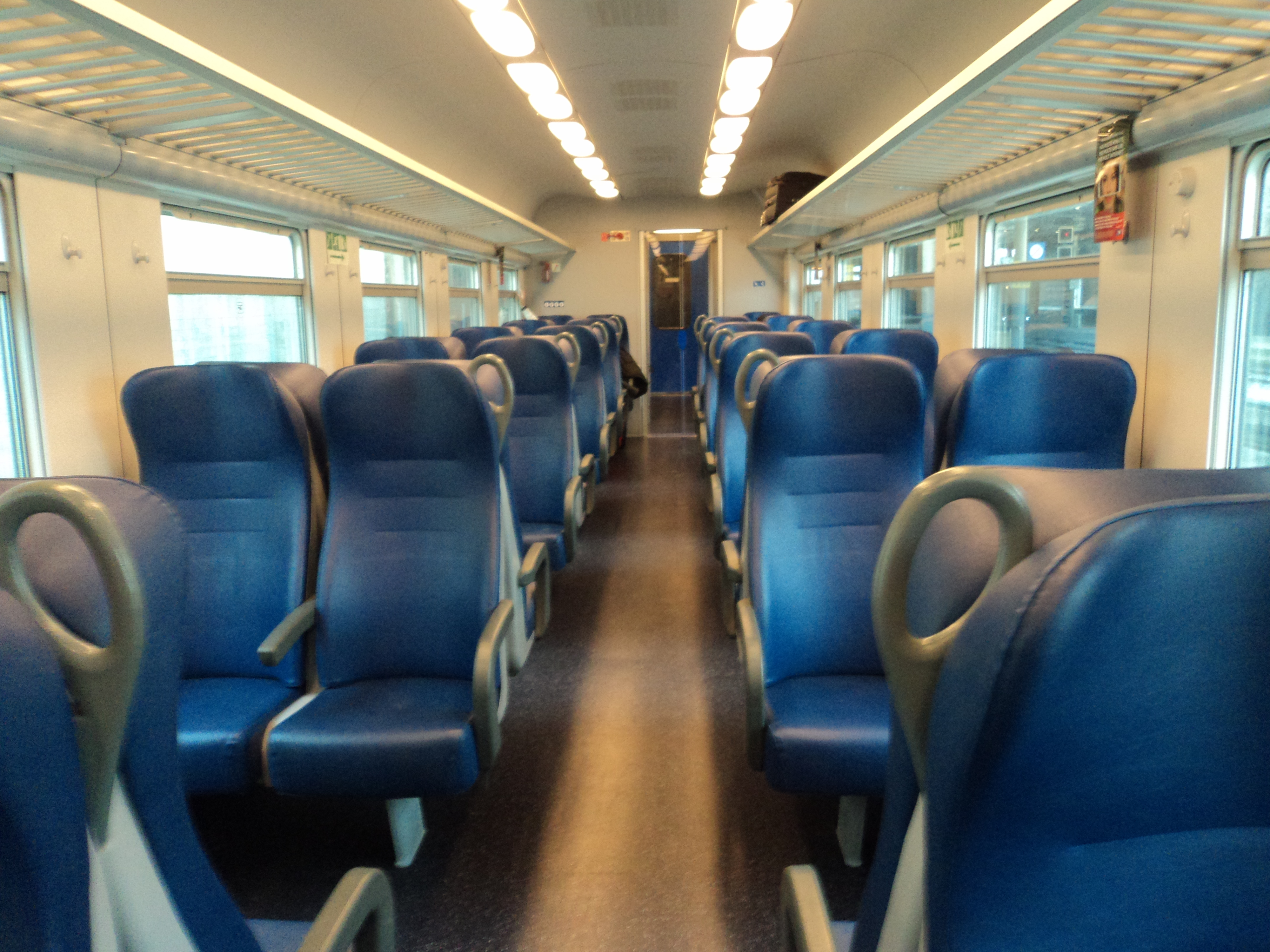 MDVE coaches in Rome